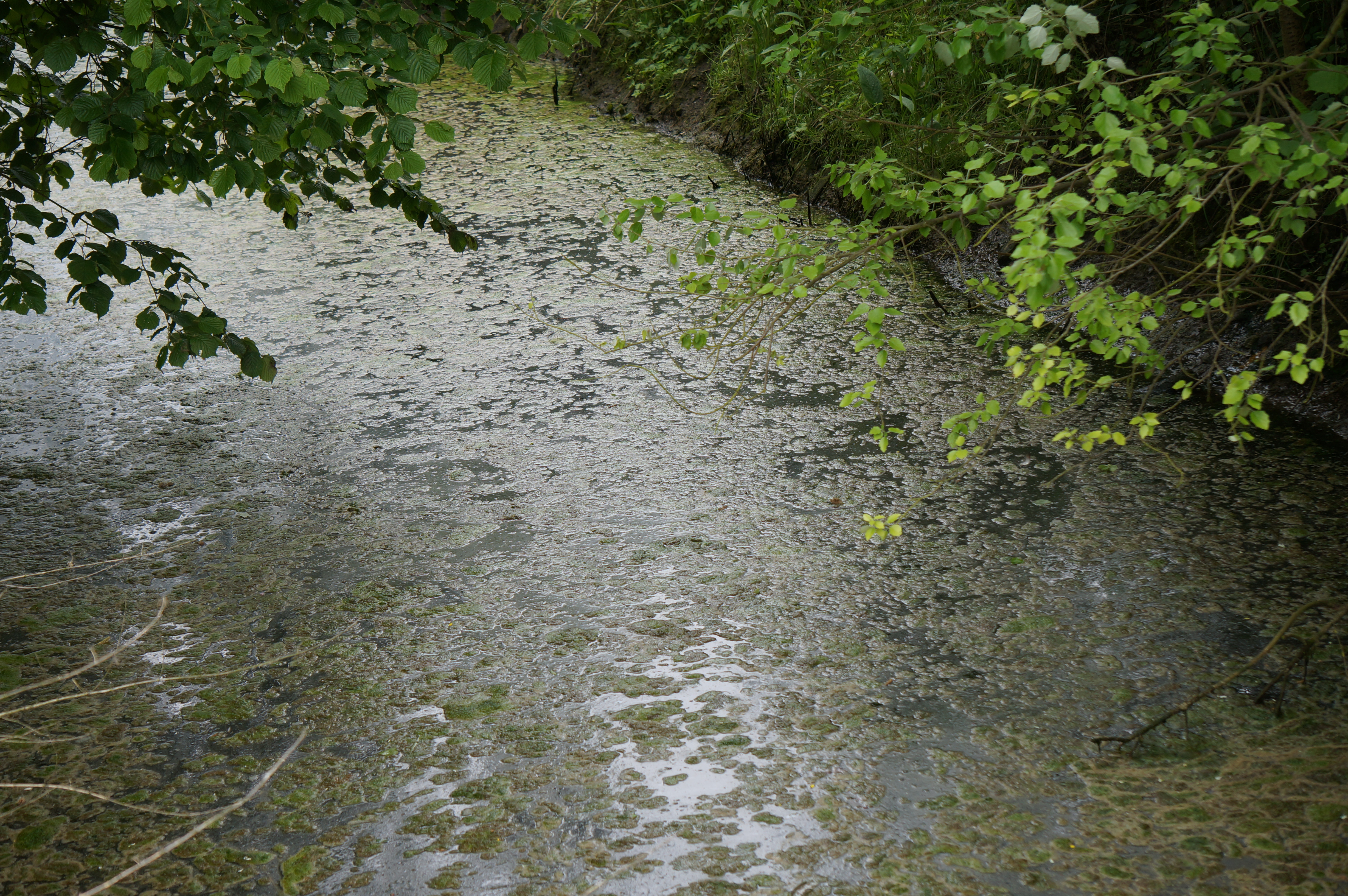 La Noire Eau dans la Réserve naturelle régionale des Annelles, Lains et Pont Pinnet Nord-Pas-de-Calais-Picardie